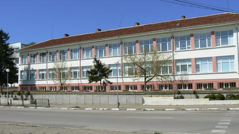 училището в град Кула